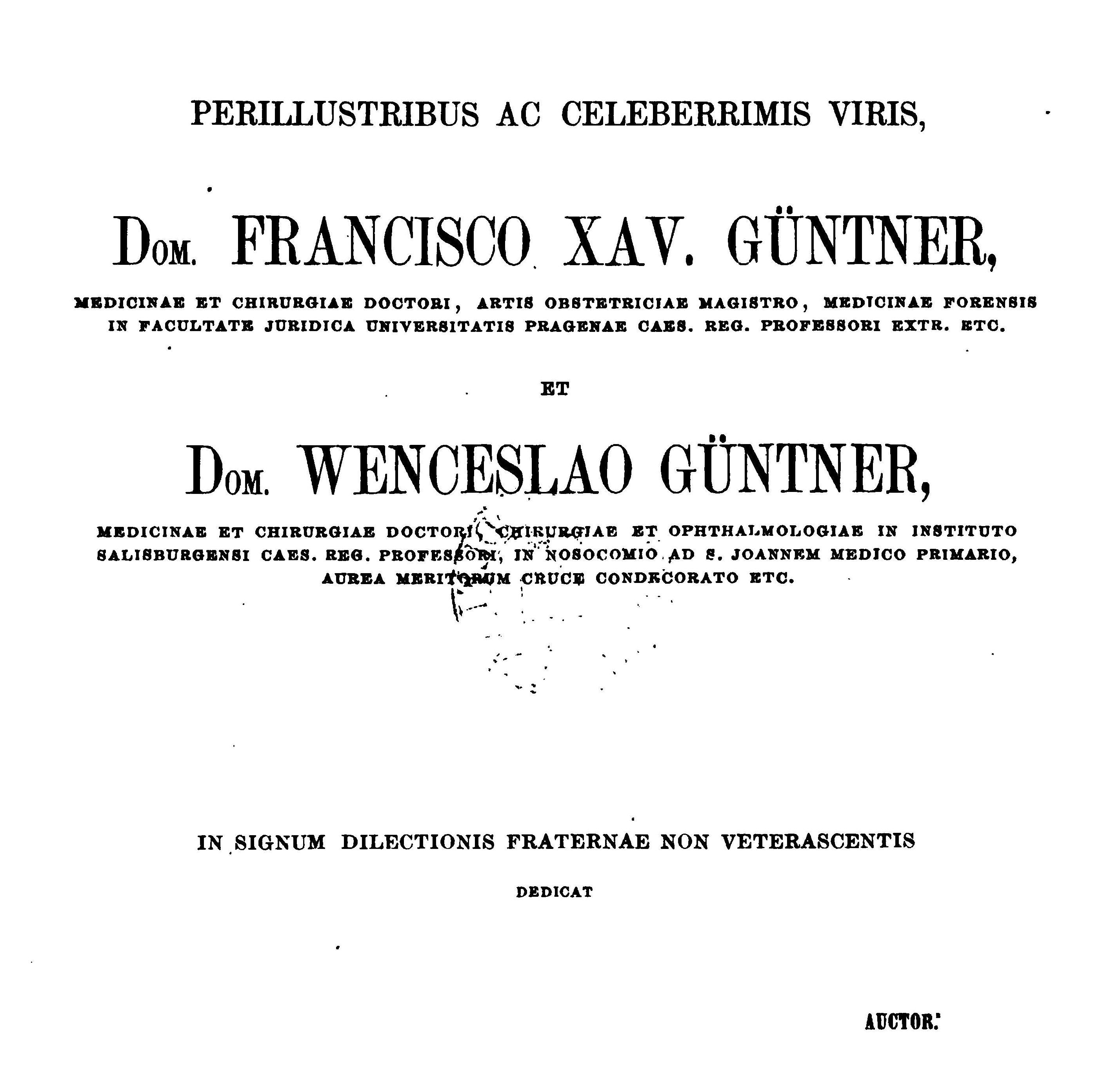 Gabriel Güntner O.Praem., Widmung seines Buchs Introductio in sacros Novi Testamenti libros an seine Brüder, die Medizinprofessoren Franz und Wenzel Güntner